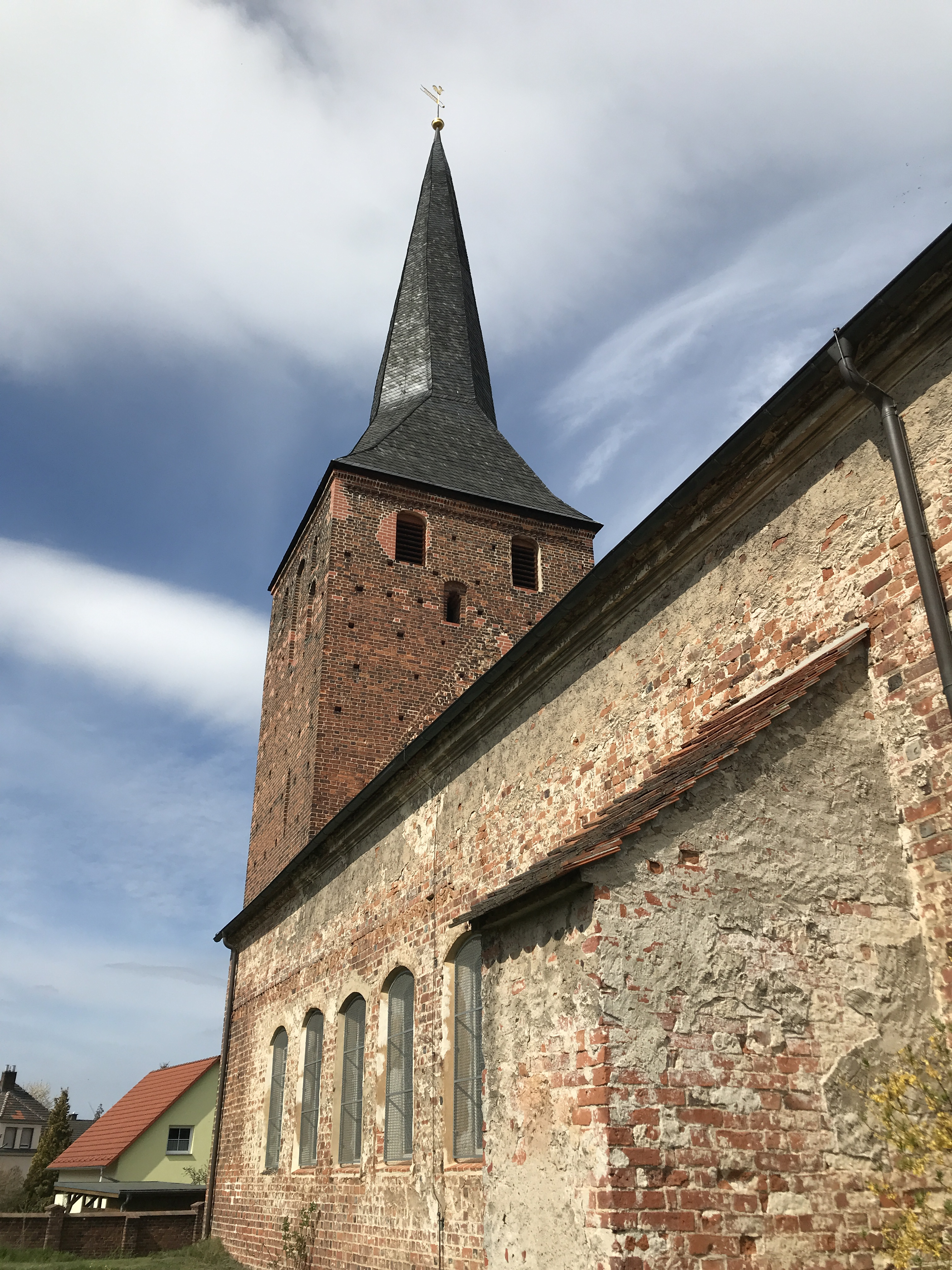 Die Dorfkirche Krieschow in der Gemeinde Kolkwitz im Landkreis Spree-Neiße ist eine Saalkirche aus dem 15. Jahrhundert. Im Innern steht unter anderem ein Altarretabel aus dem Jahr 1680.